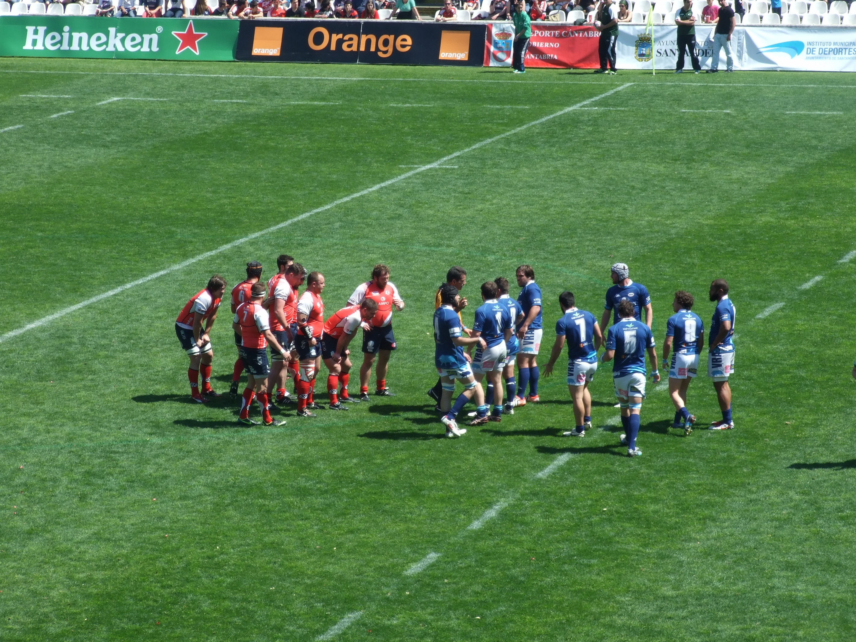 Copa del Rey de rugby 2013. VRAC Quesos Entrepinares ante AMPO Ordizia.